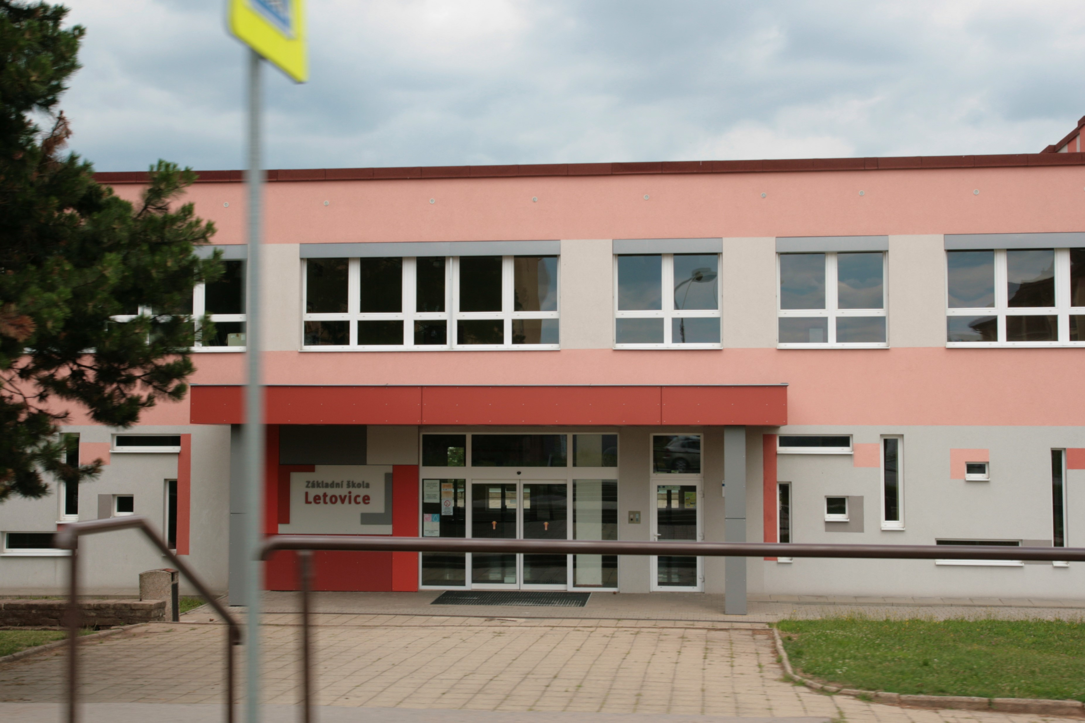 Město Letovice v okrese Blansko. Základní škola na adrese Komenského 902/5.